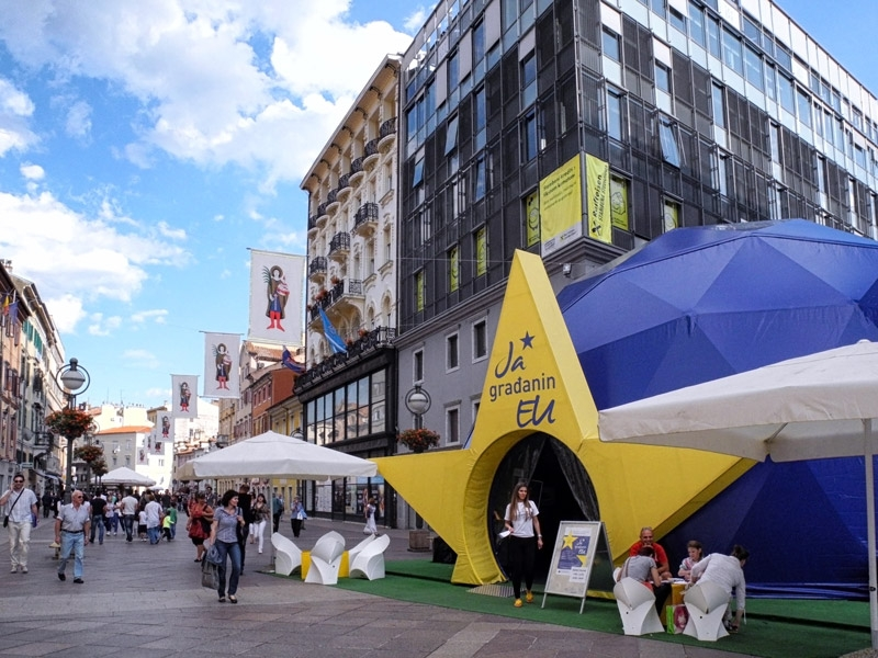 Multimedijska izložba “Ja - građanin EU” u Rijeci.